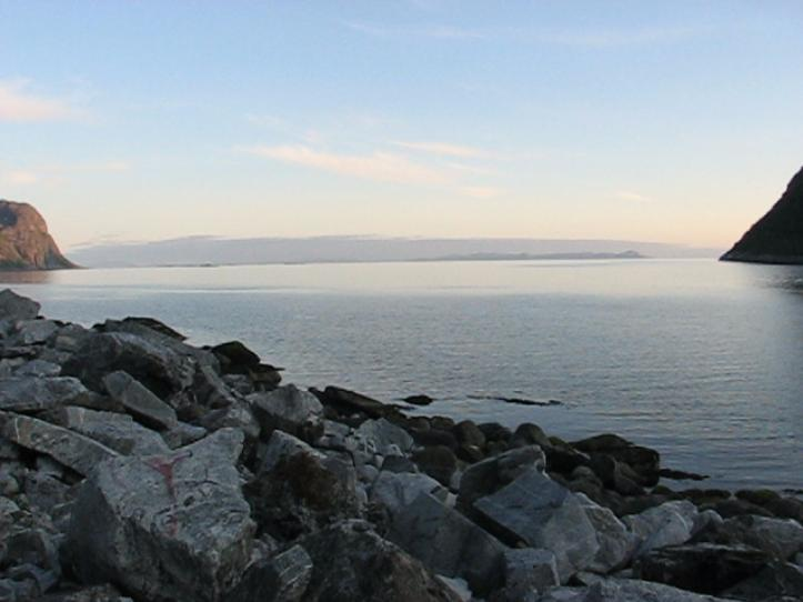 Gryllefjorden fjord, Torsken municipality, Norway